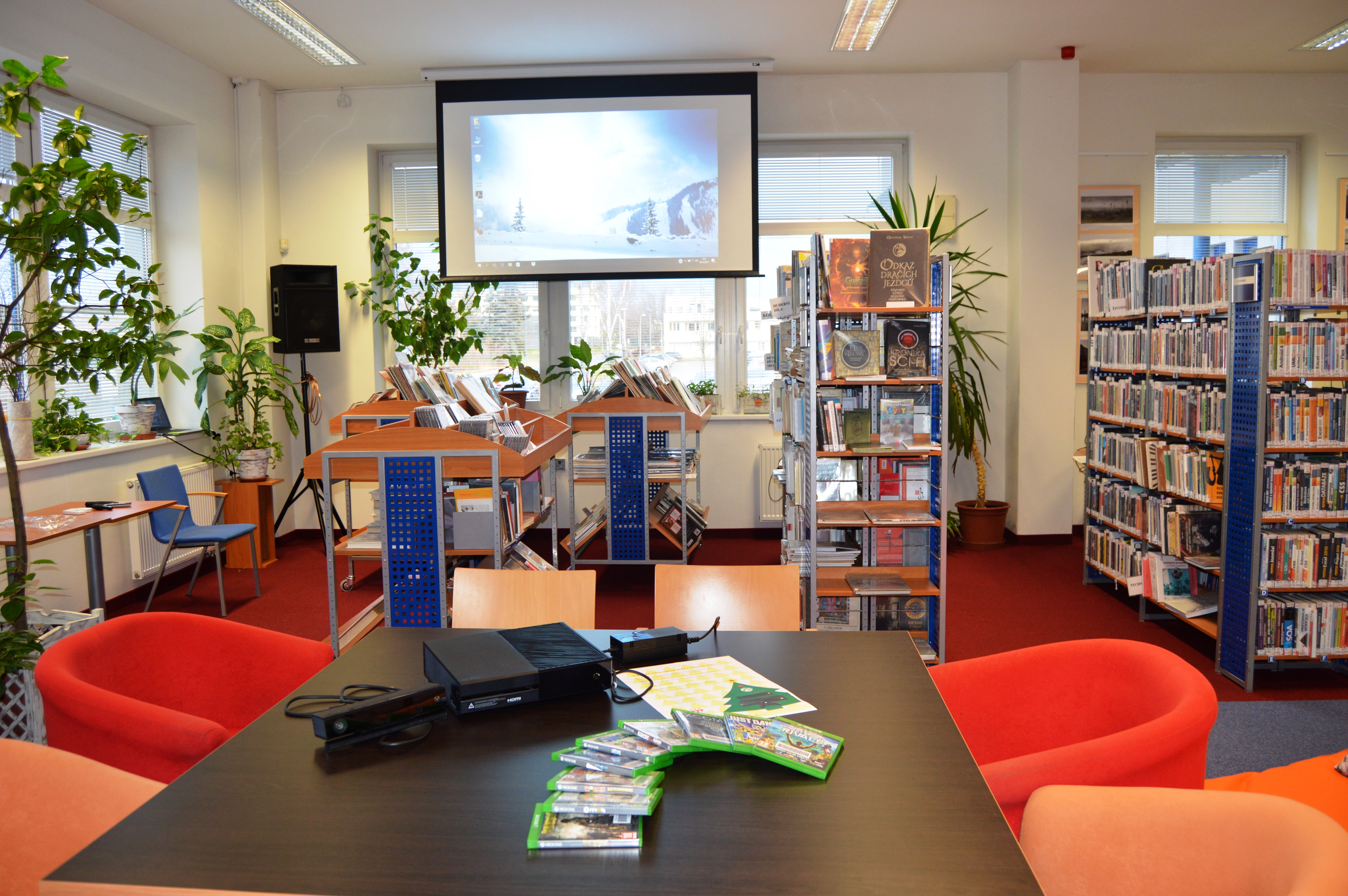 XBox a data projektor v A klubu.